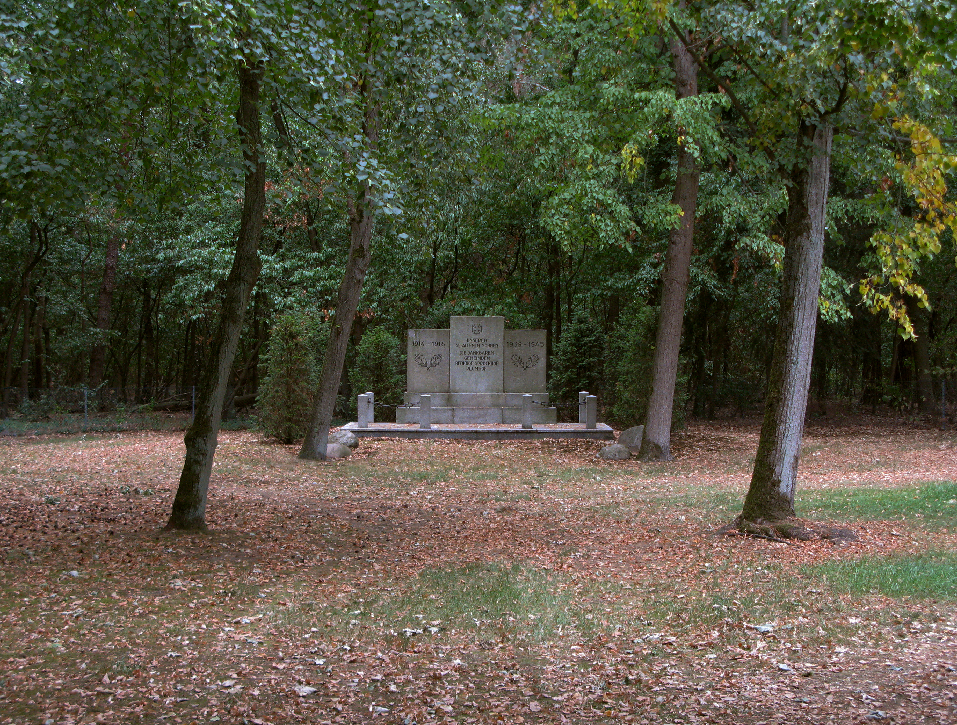 Gedenkstätte auf dem Friedhof in Berkhof für die Gefallenen des 1. und des 2. Weltkrieges